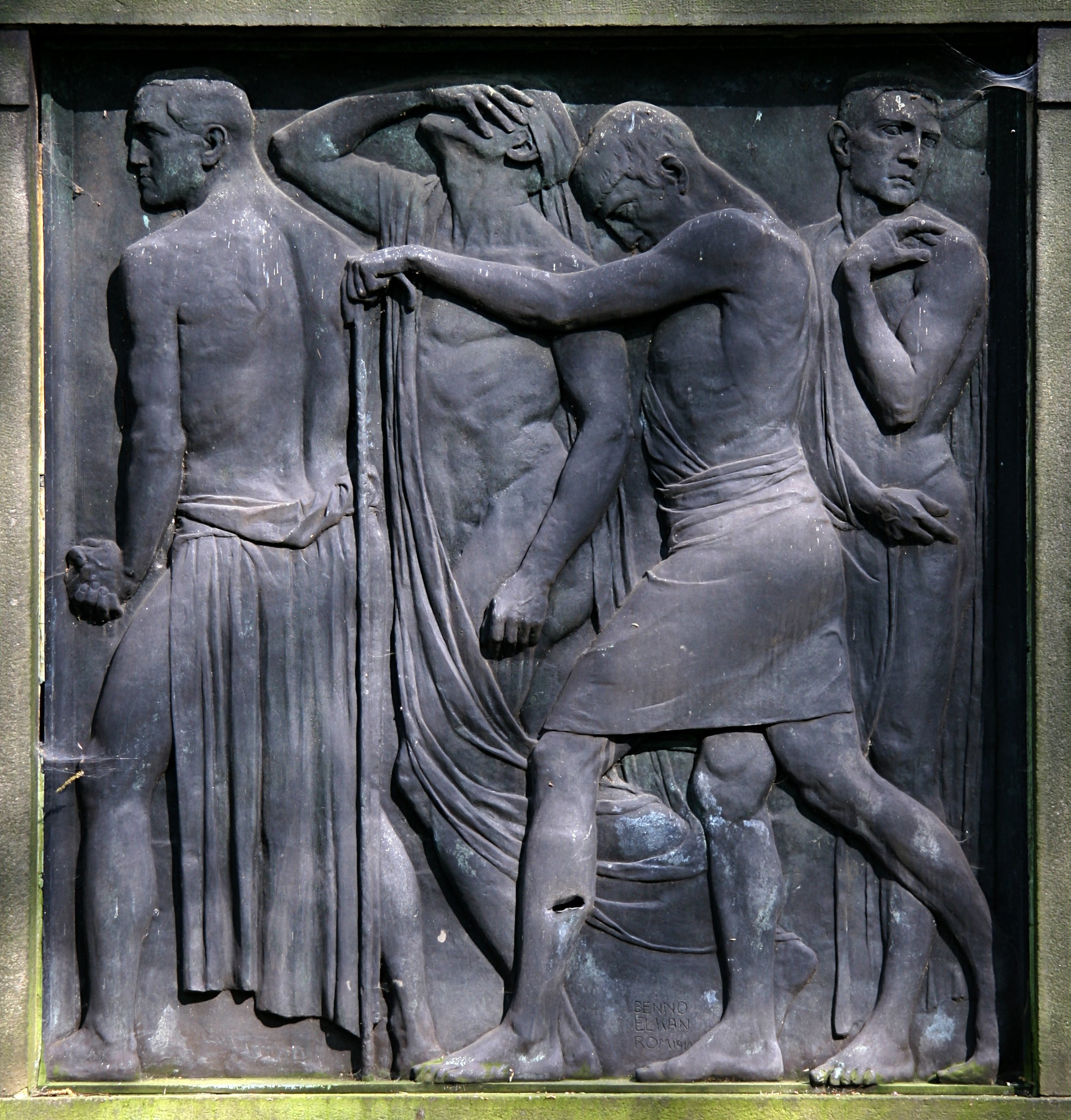 "Todesgang" von Benno Elkan, 1910. Grabmal auf dem Ostenfriedhof in Dortmund